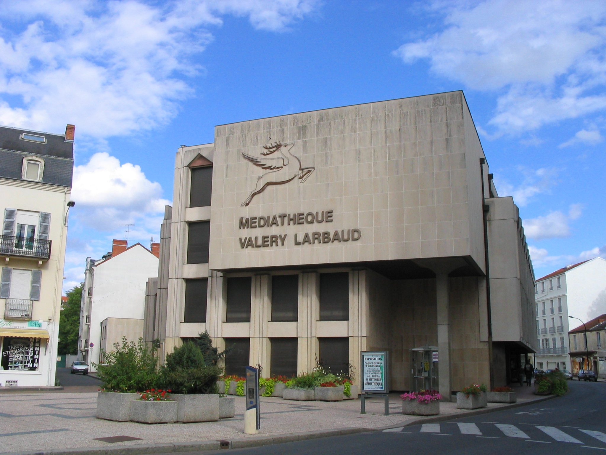 La Médiathèque Valery Larbaud, rue du Maréchal Lyautey, Vichy(France).